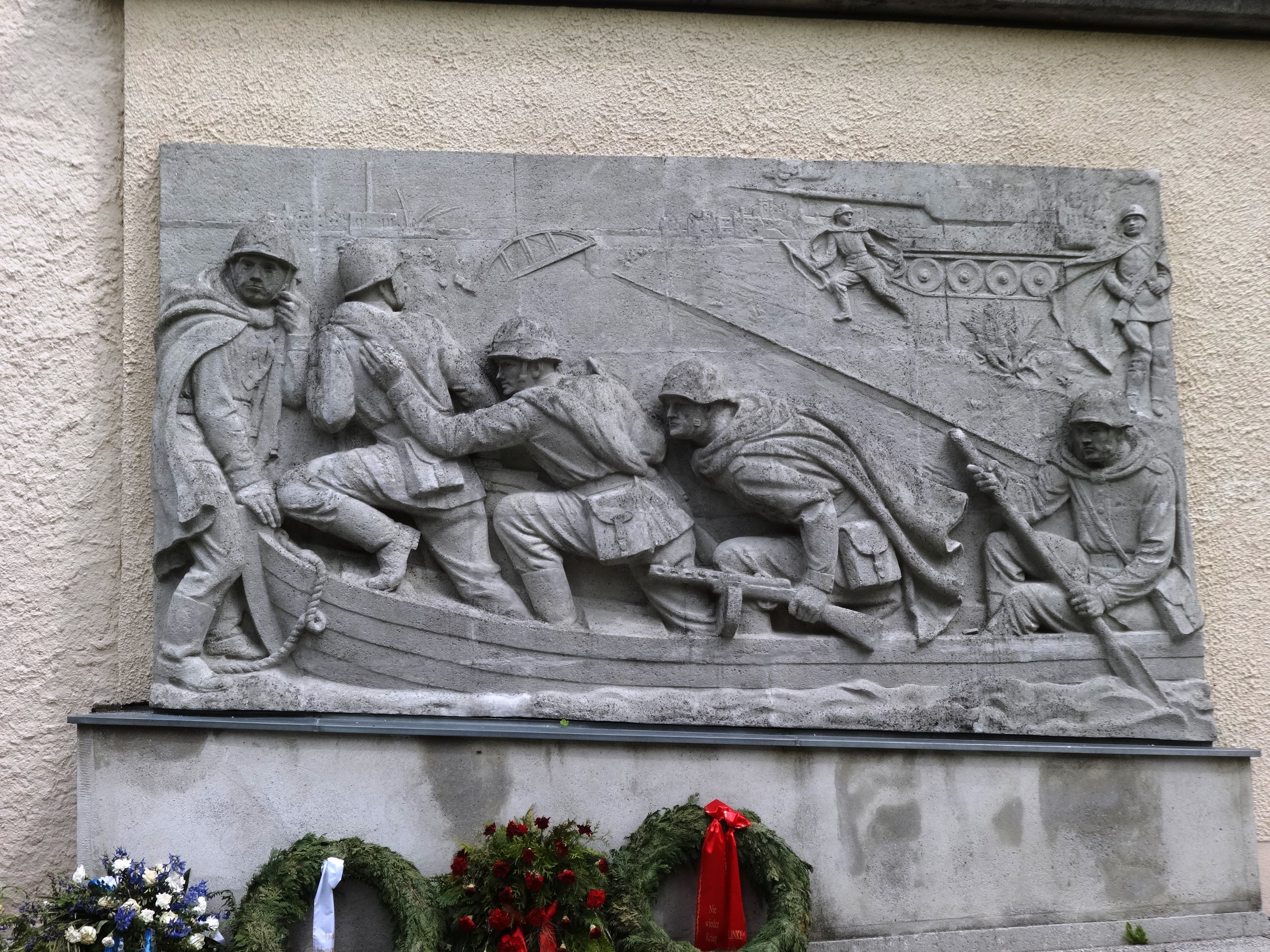 Der Sowjetische Ehrenfriedhof ist eine Gedenkstätte in Baruth/Mark im Landkreis Teltow-Fläming in Brandenburg (Deutschland). Sie erinnert an die im Kessel von Halbe gefallenen Soldaten der 3. und 4. Panzerarmee der Roten Armee und gilt als eine der größten und bedeutendsten russischen Kriegsgräberstätten in Brandenburg.